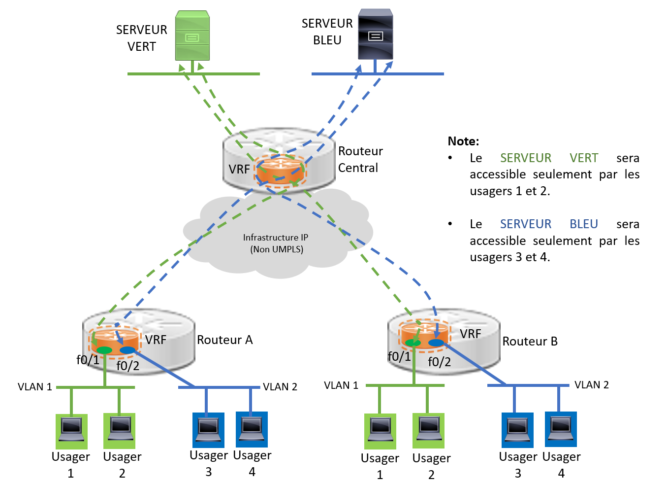 L'image doit être utilisée pour aider au lecteur à comprendre le concept de "VRF lite"